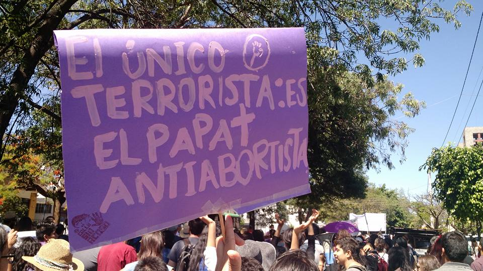 24 de abril de 2016 en Guadalajara, Jalisco, México. Marcha contra las violencias machistas